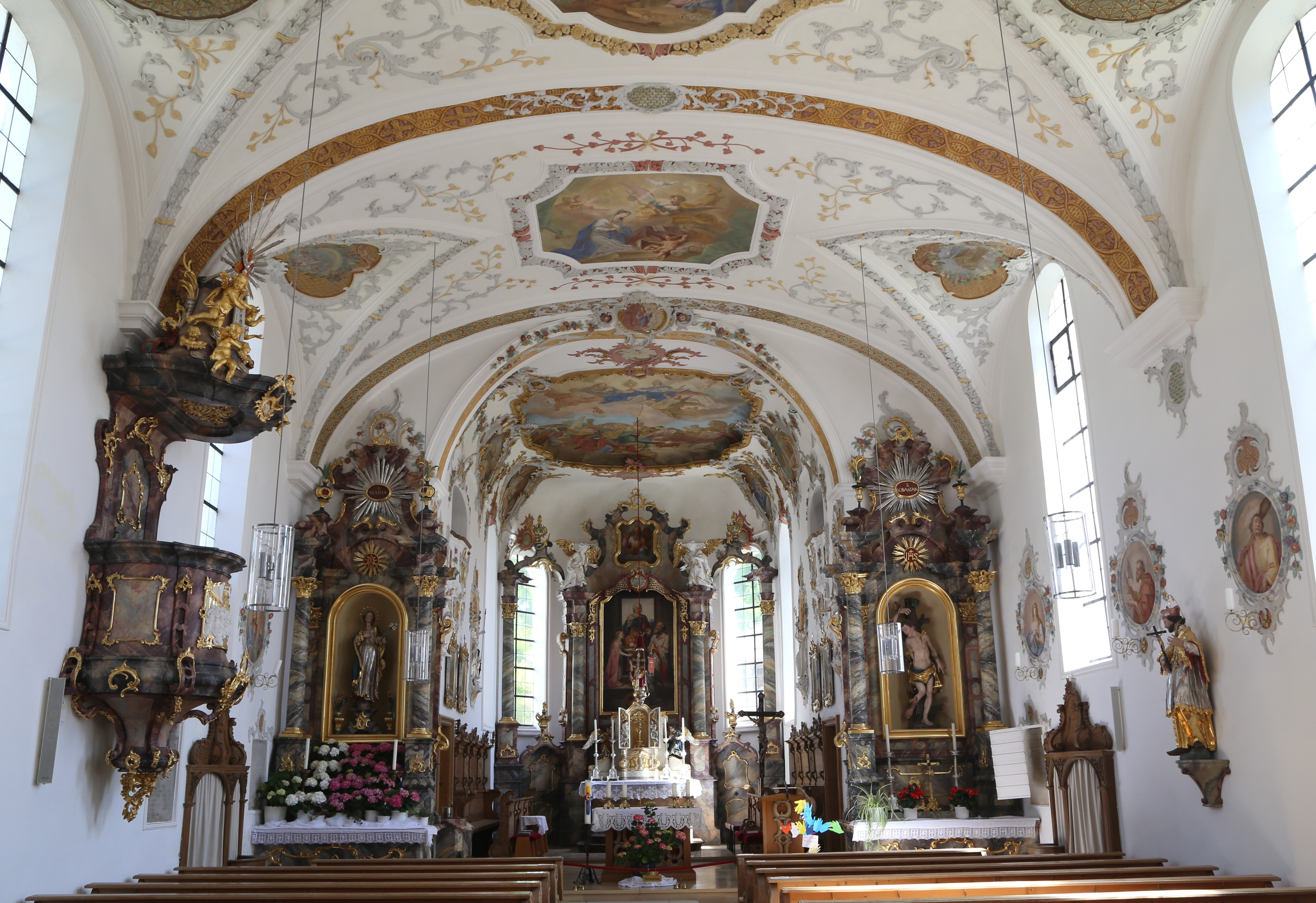 Augsburger Straße 1, Dinkelscherben; Katholische Pfarrkirche St. Anna, 1507 errichtet, Turm um 1580, Barockisierung 1717 und 1770; mit Ausstattung